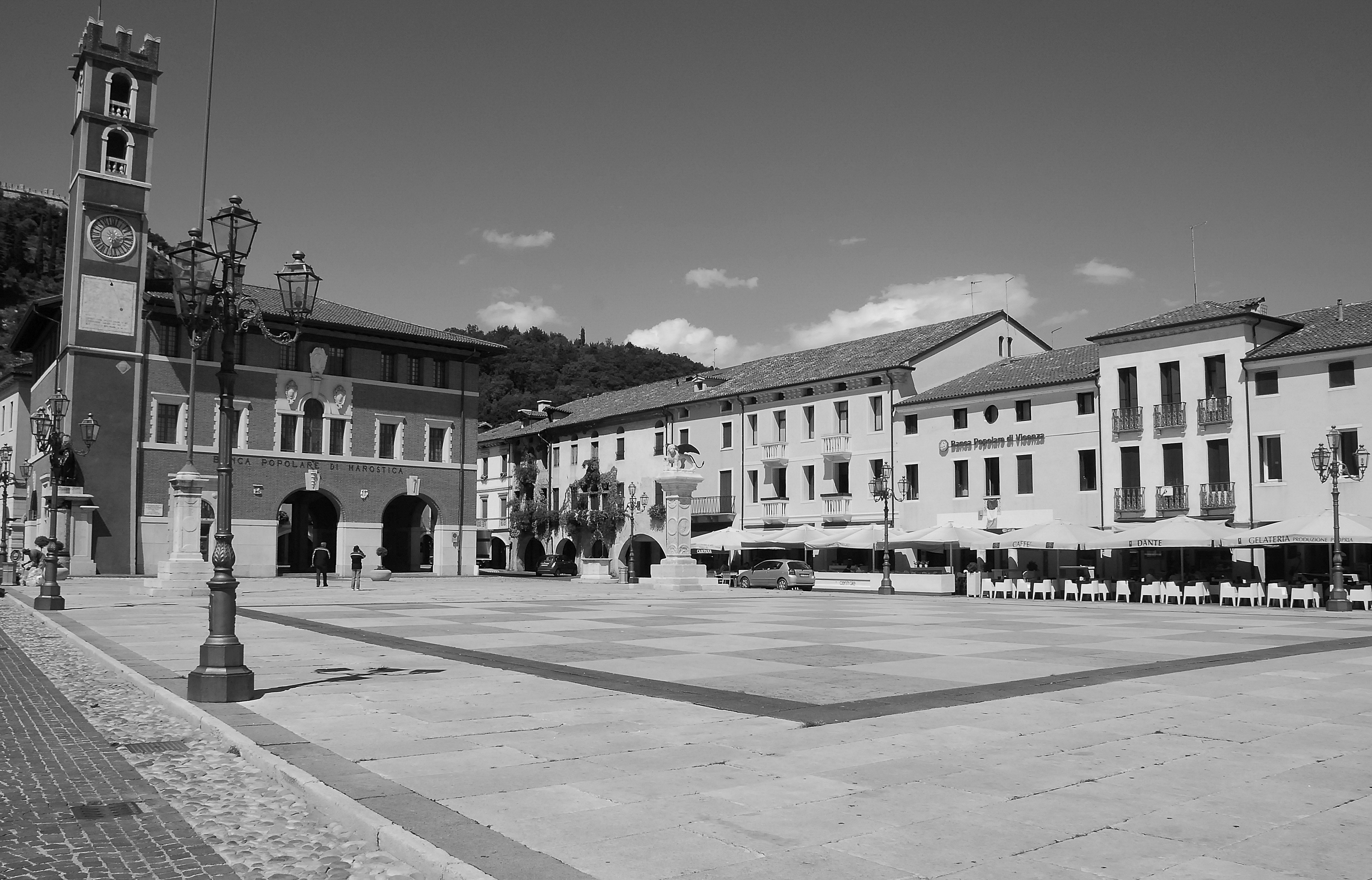 Marostica (VI), ITA